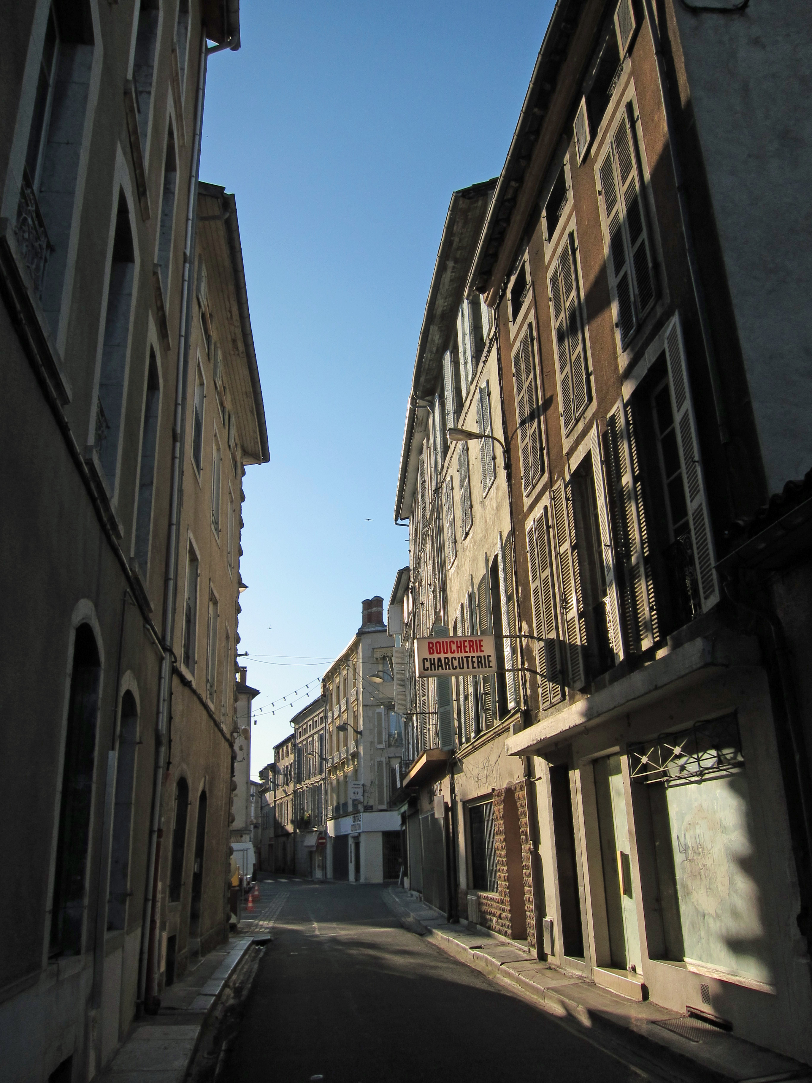 Saint-Girons (Ariège, France) : La rue Saint-Valier vers la place Pasteur ; en arrière-plan, la rue de la République.